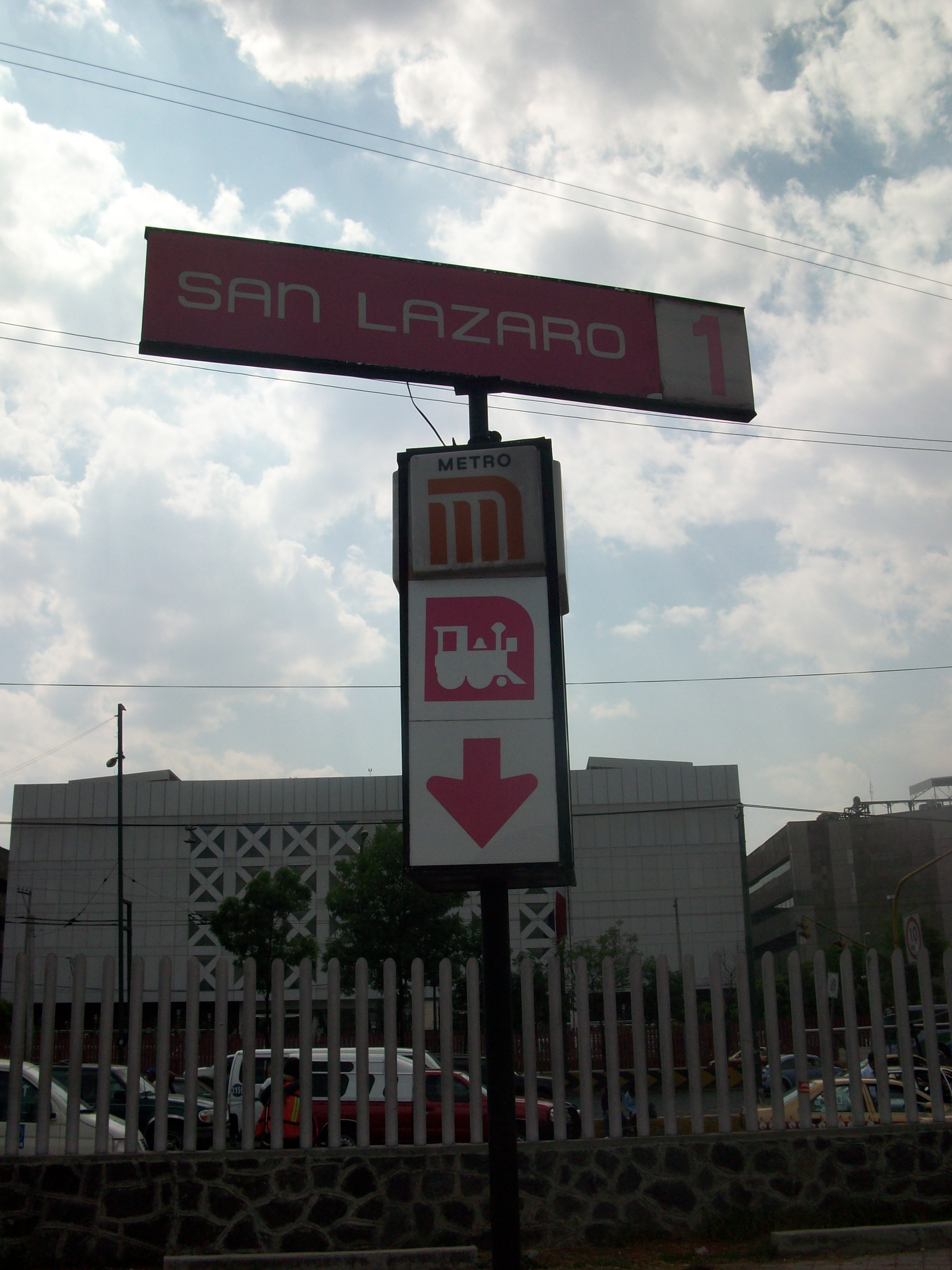 Letrero de la estacion San Lazaro